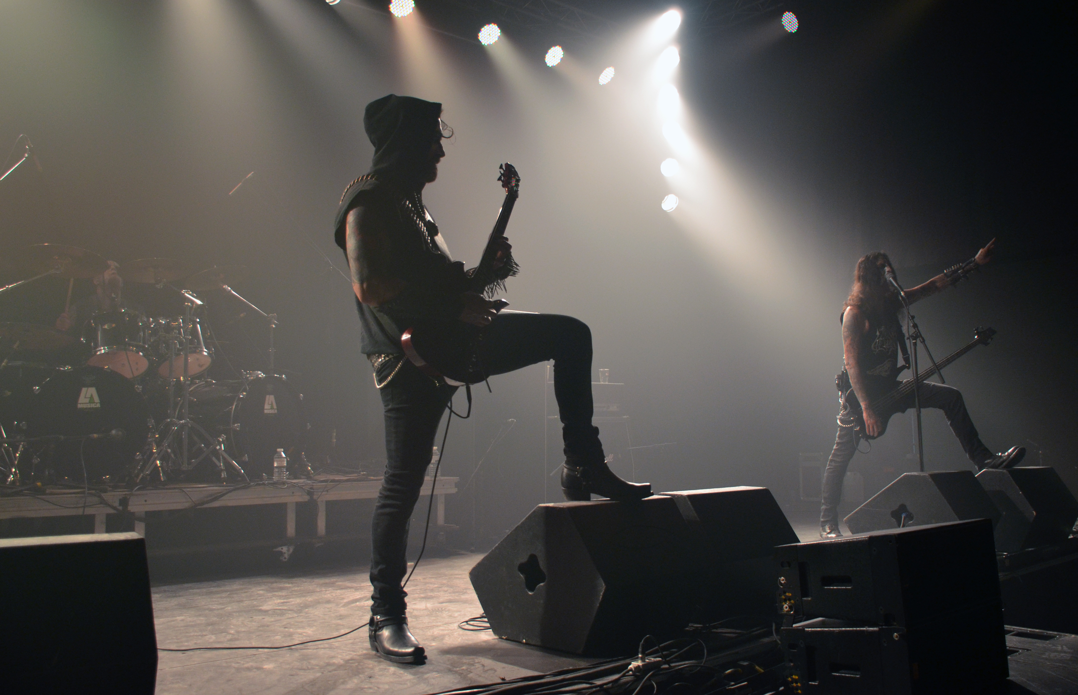 Archgoat at the Throne Fest 2016, in Kuurne, the 14th of May 2016.